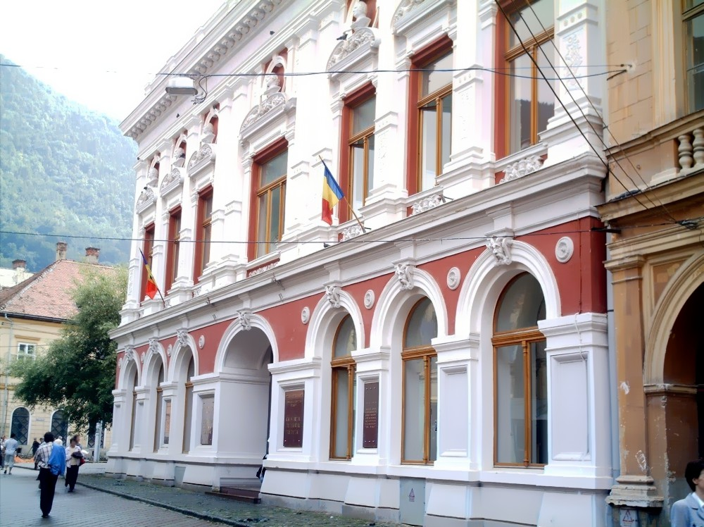 Centrul Cultural Reduta from Braşov